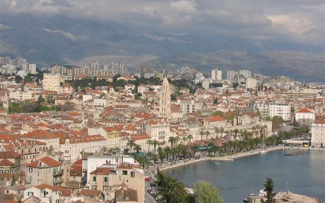 Vue sur le port de Split